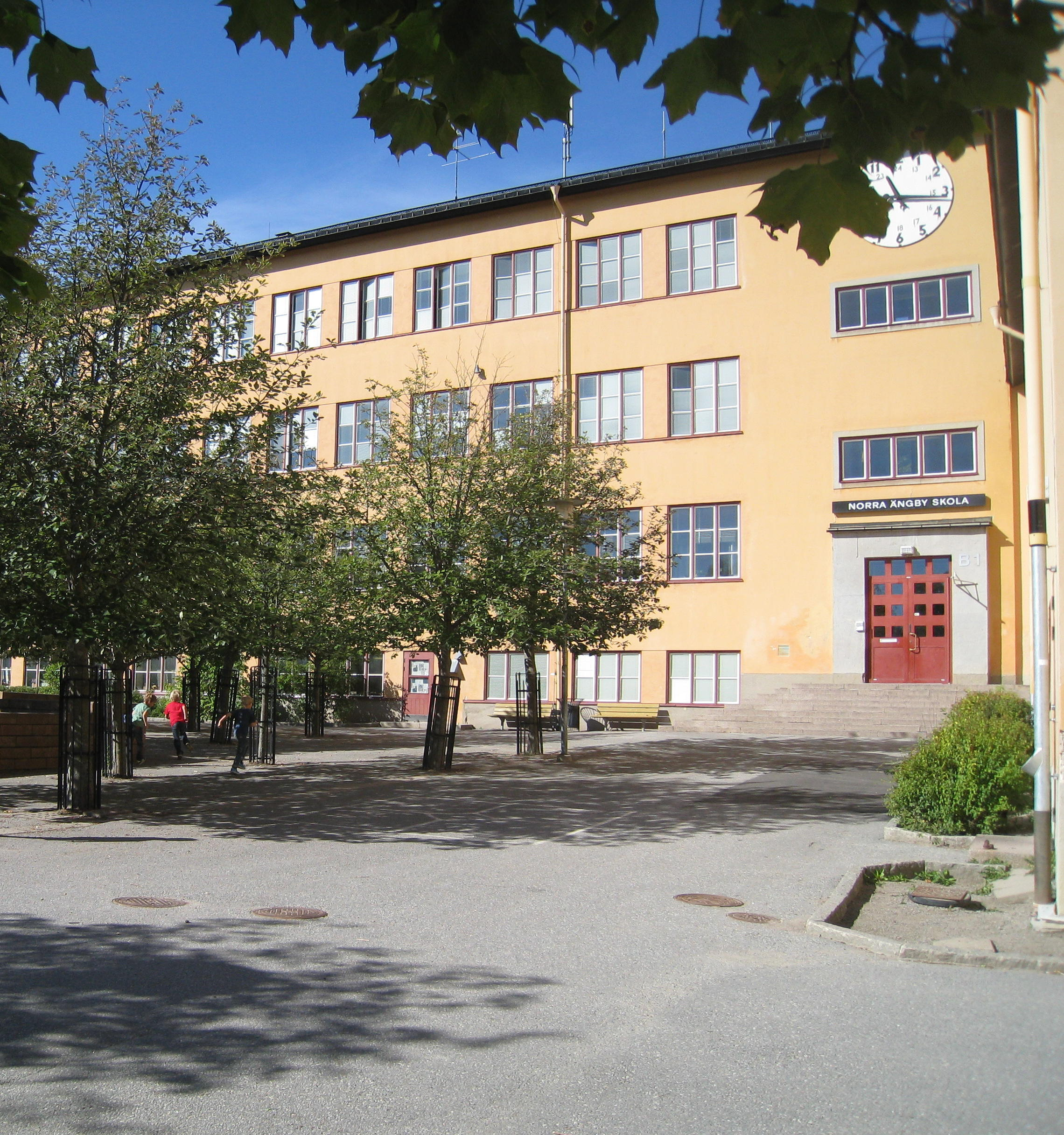 Norra Ängby skola i Bromma, väster om Stockholm. Skolan ligger på Vultejusvägen 20 i Norra Ängby och byggdes 1936. Arkitekt var Ture Ryberg.